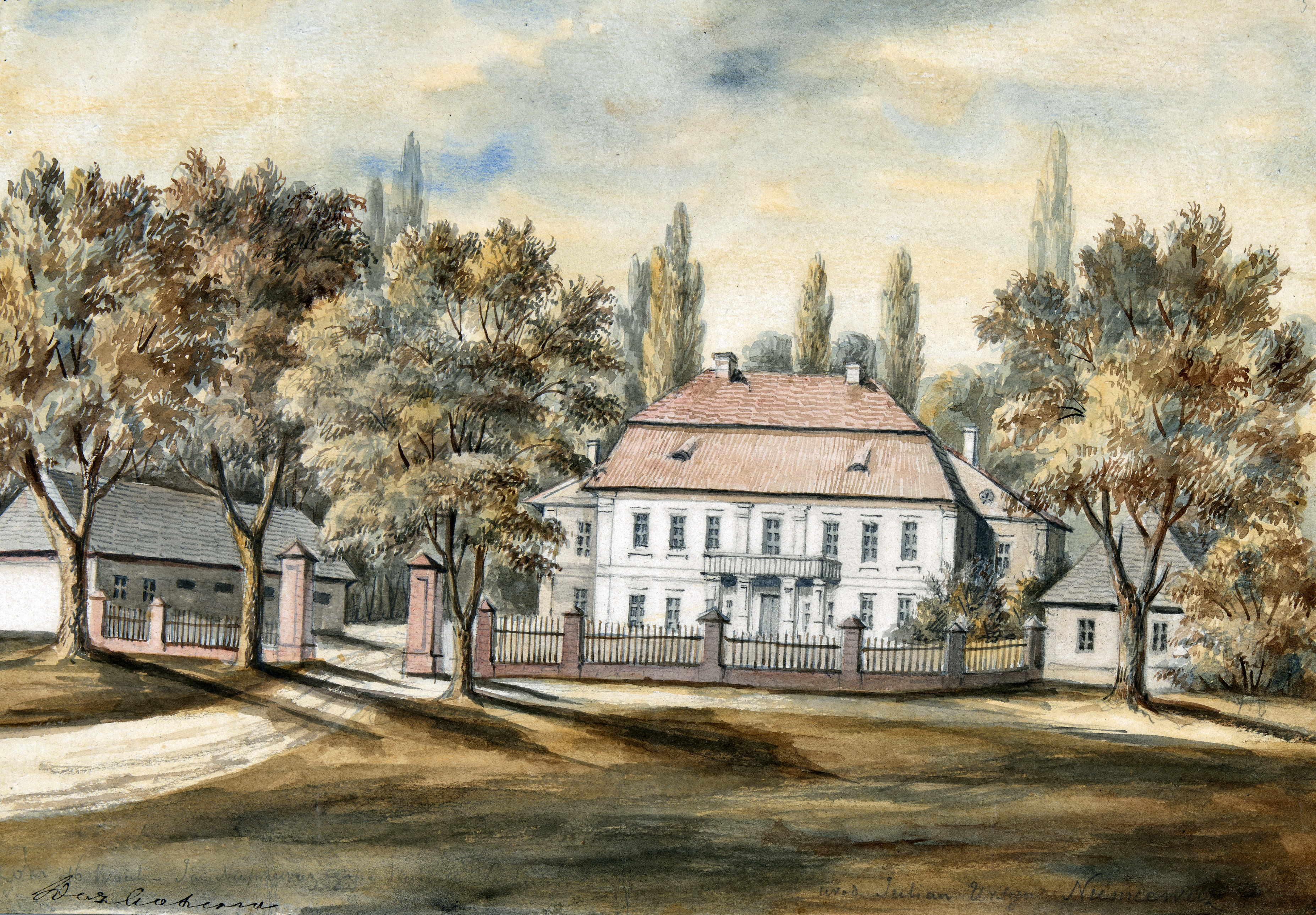 Беларуская (тарашкевіца): Скокі (Skoki), сядзіба Нямцэвічаў (Niamcevič)